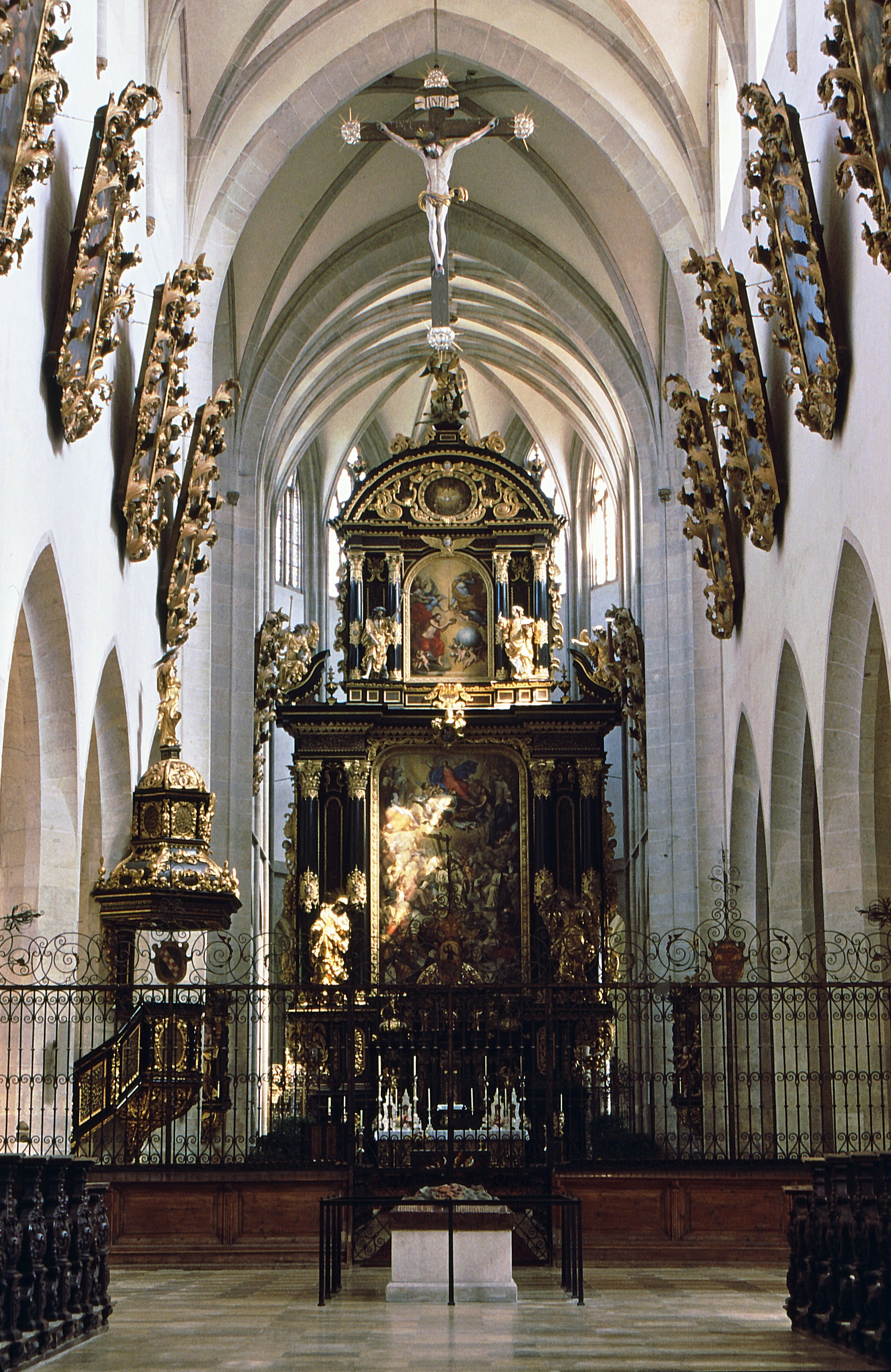 Hochaltar in der Klosterkirche von Kaisheim von Andreas Thamasch, 1673